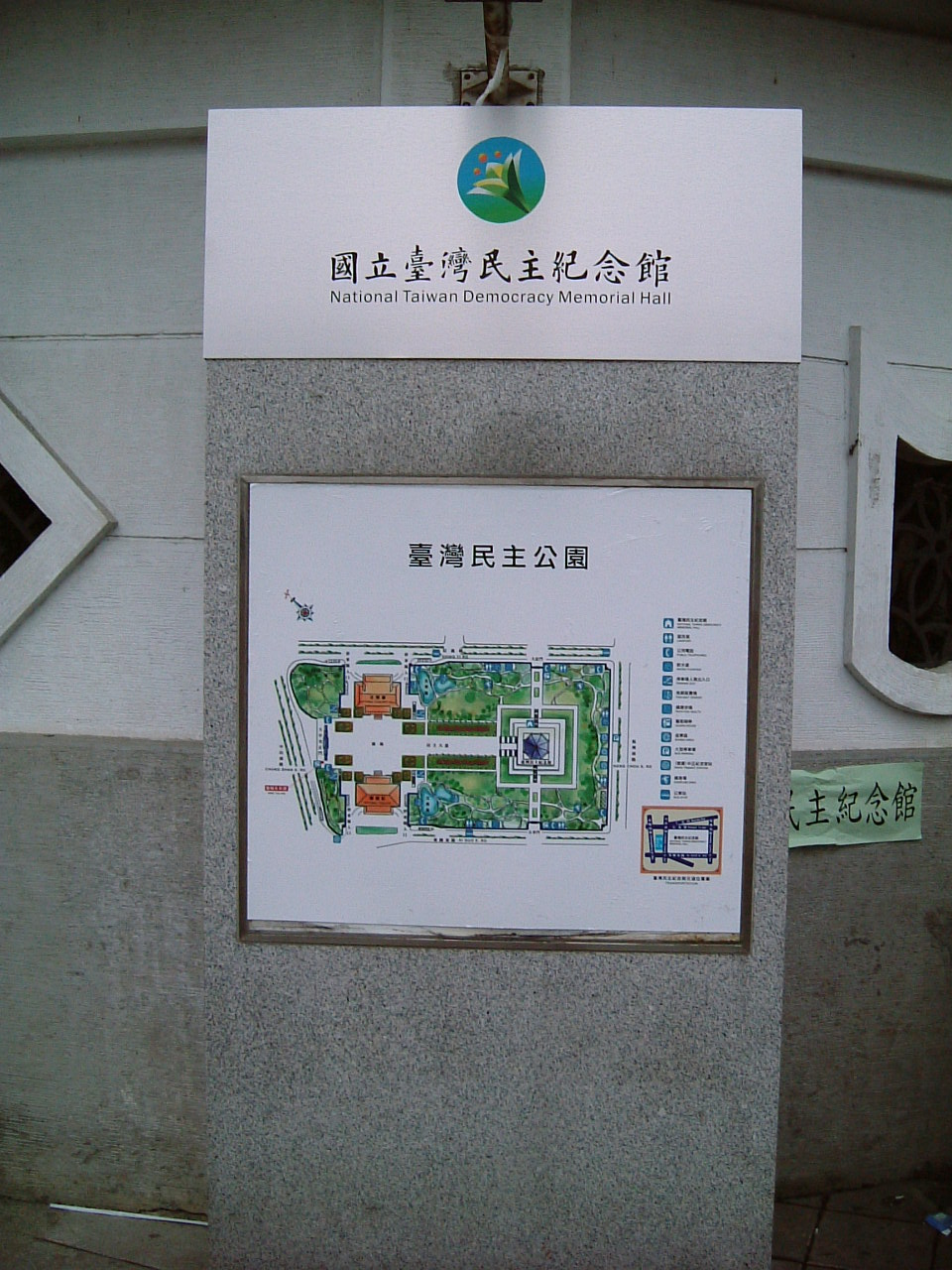 位於國立臺灣民主紀念館內臺灣民主公園的地圖導覽，位於其大門口旁